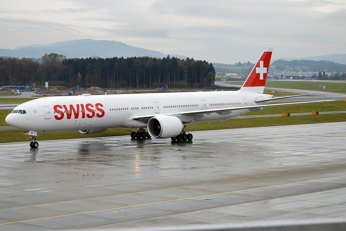 Swiss, HB-JNB, Boeing 777-3DE ER